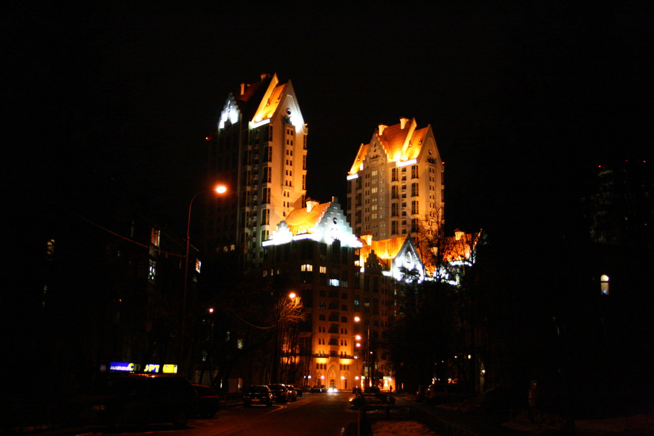 Жилой комплекс "Эльсинор". Вид с улицы маршала Соколовского.